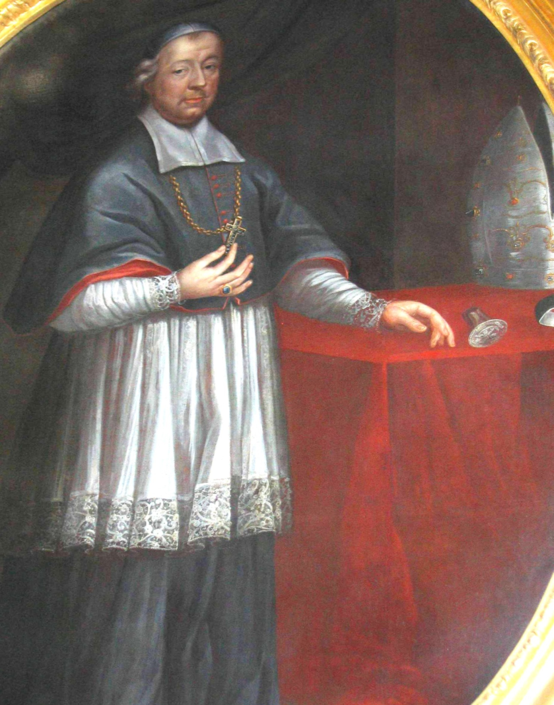 Jerzy Albrecht Denhoff Bishop of Kraków author-Maciej Szczepańczyk User:Mathiasrex